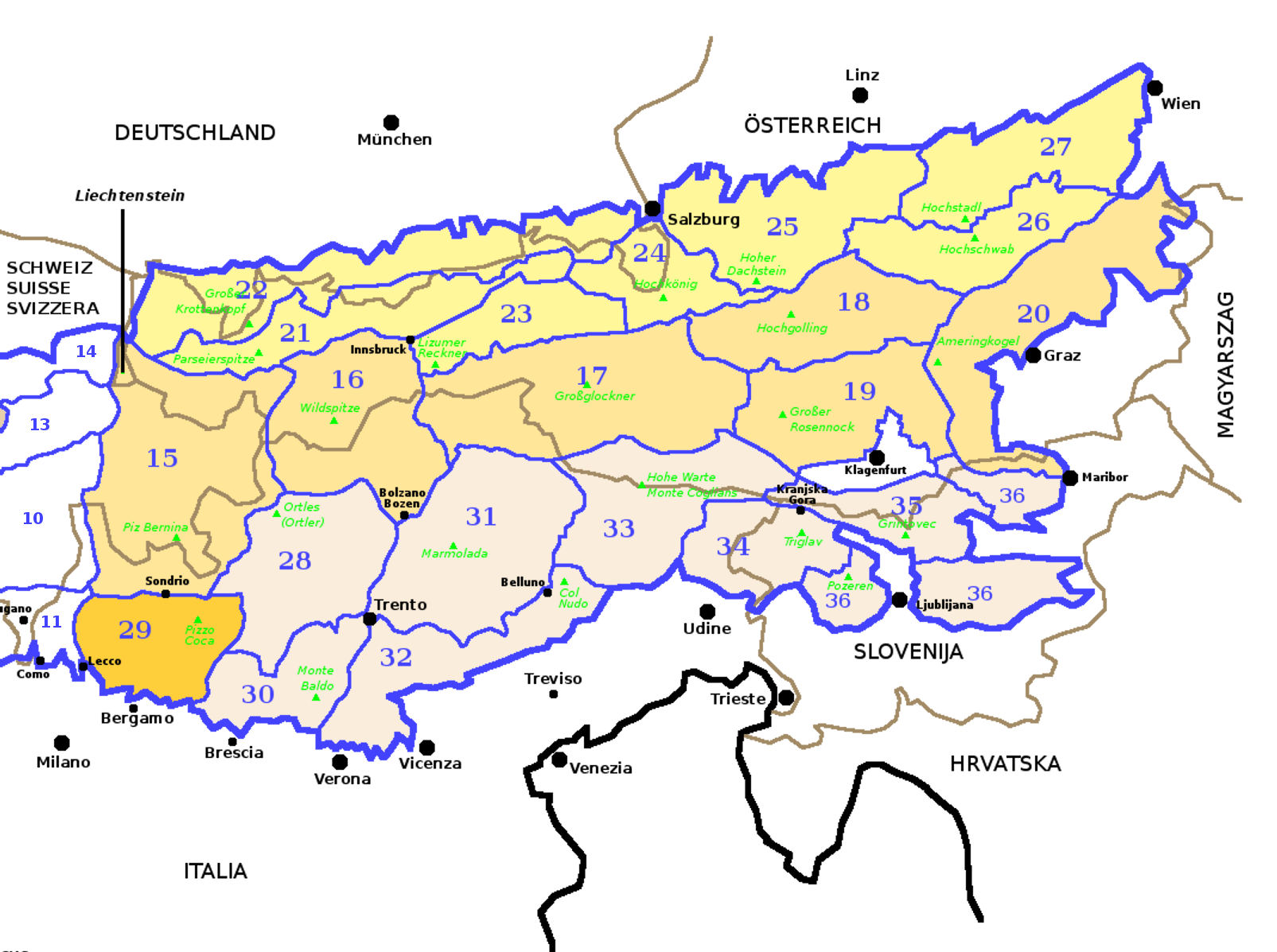 Alpi Orientali secondo la SOIUSA con evidenziate le Alpi e Prealpi Bergamasche